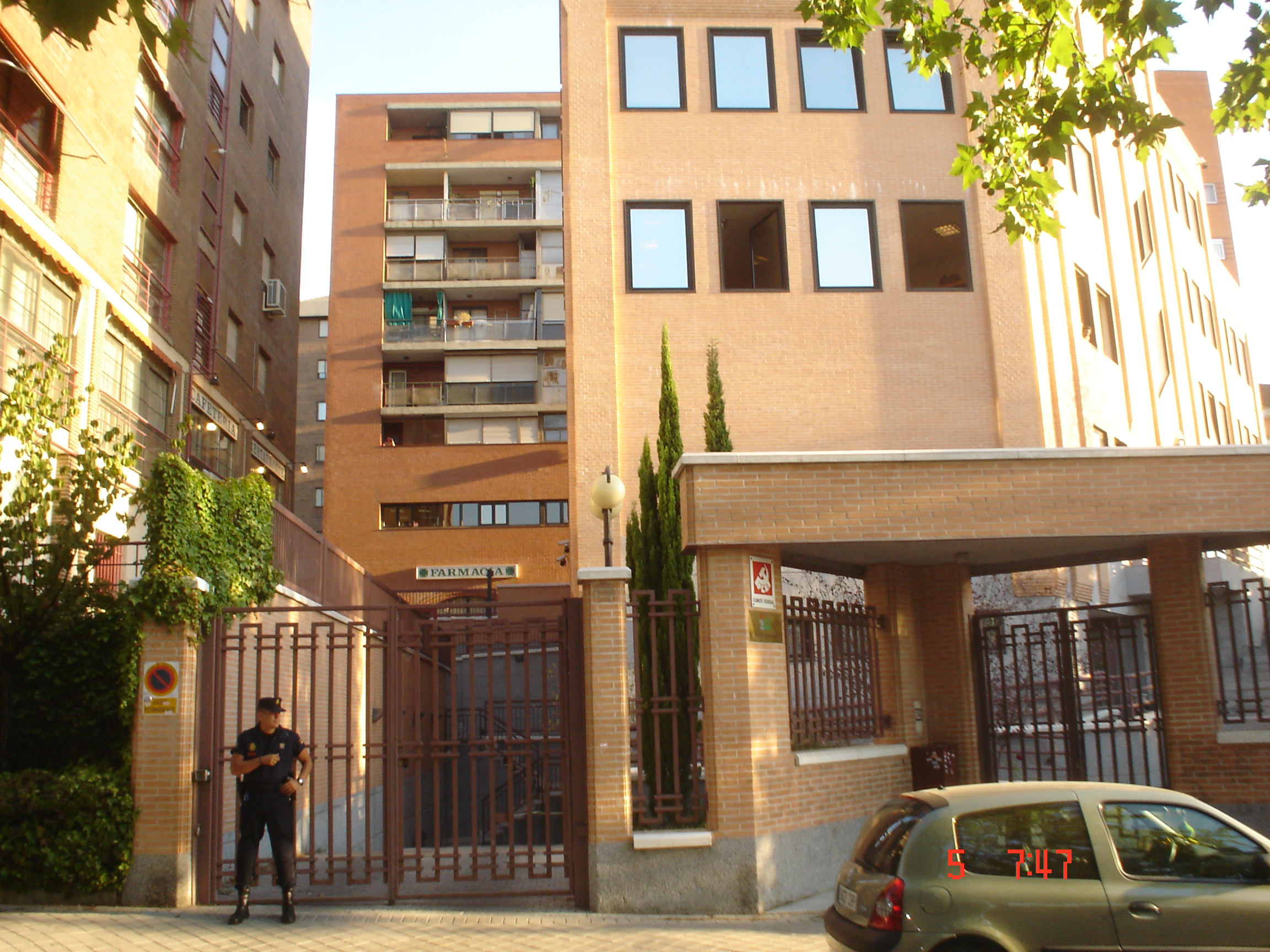 manifestacion_grua_municipal_Aussa_psoe_izquierda_unida_madrid_5_setiembre_2005-020